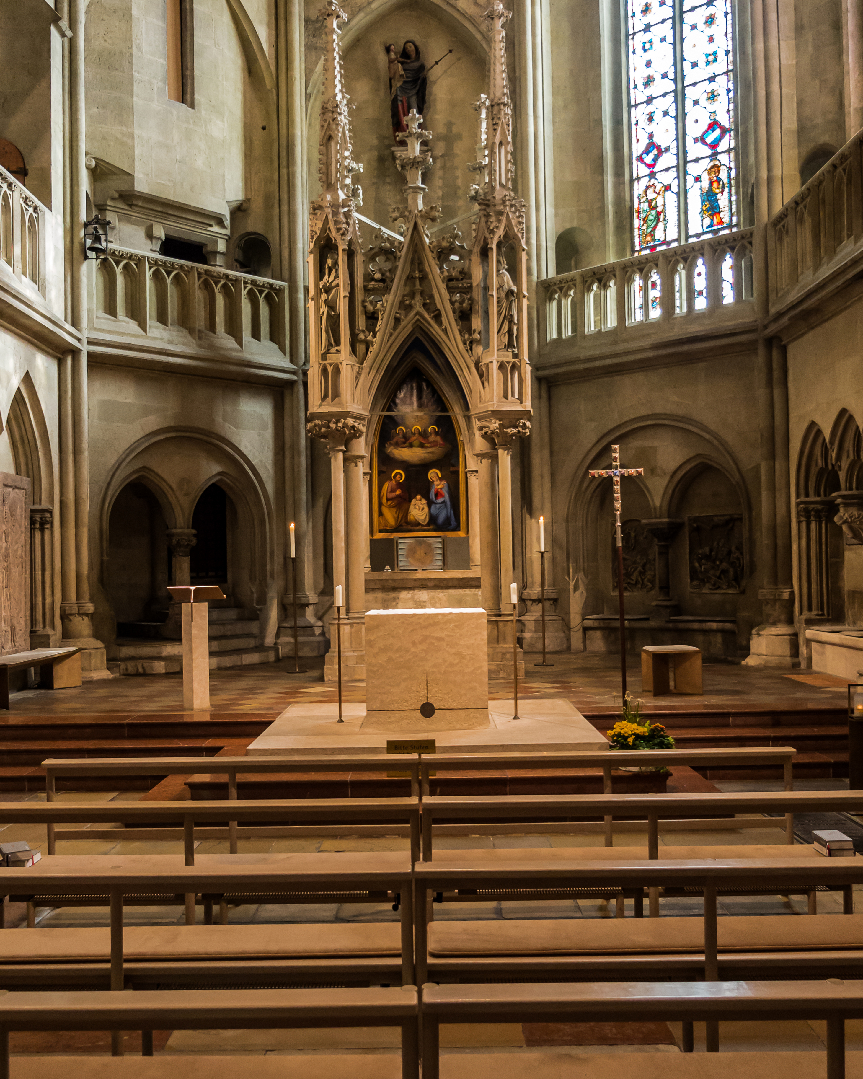 Regensburger Cathedral Interior 5